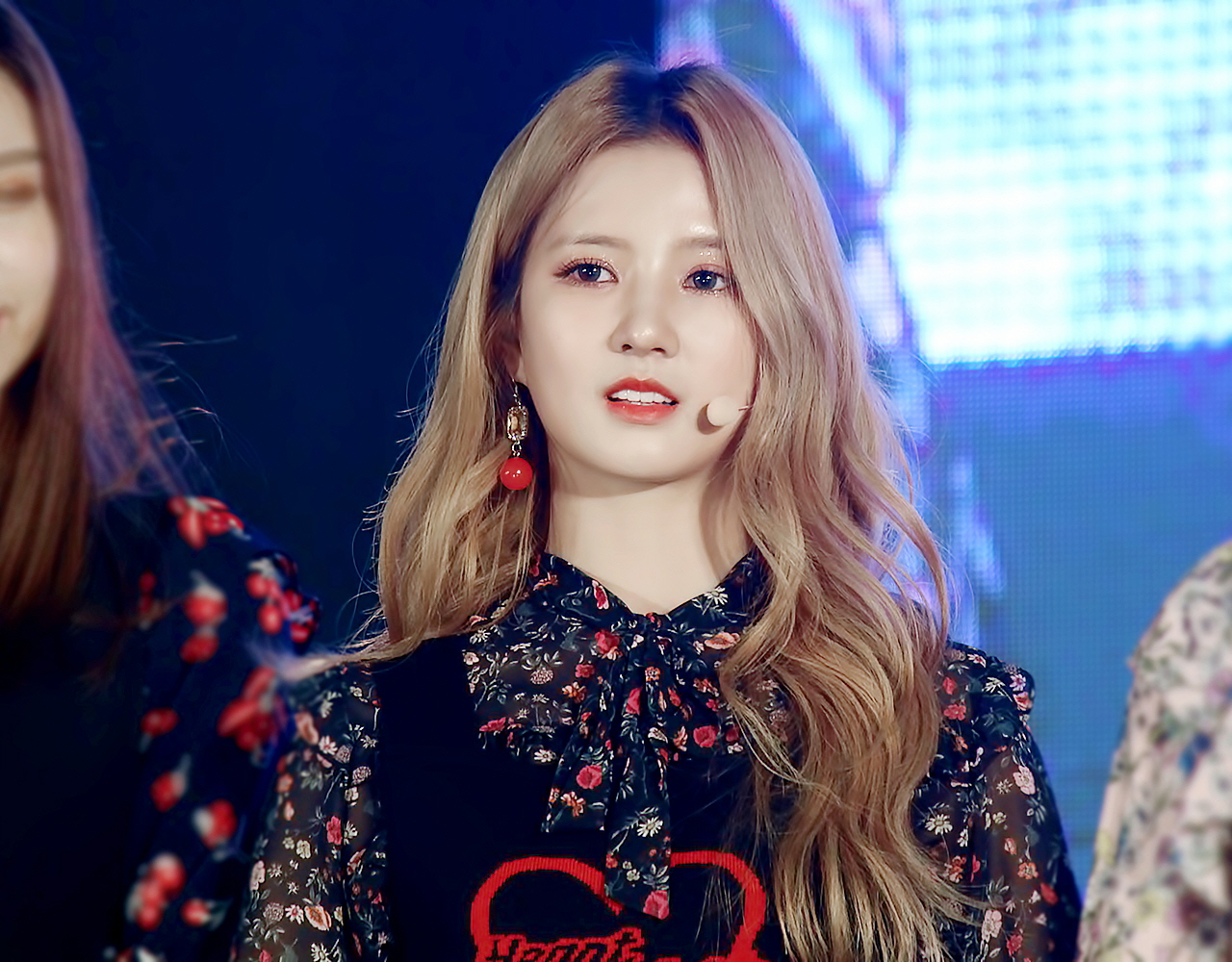 170526 안산 근로자 뮤직페스티벌 구구단 직찍